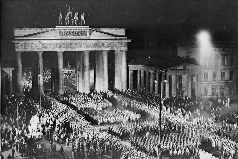 Berlin, SA-Aufmarsch am Brandenburger Tor Deutsches Reich, Berlin, Einmarsch der SA durch das Brandenburger Tor am 30.1.33 [Datum falsch]